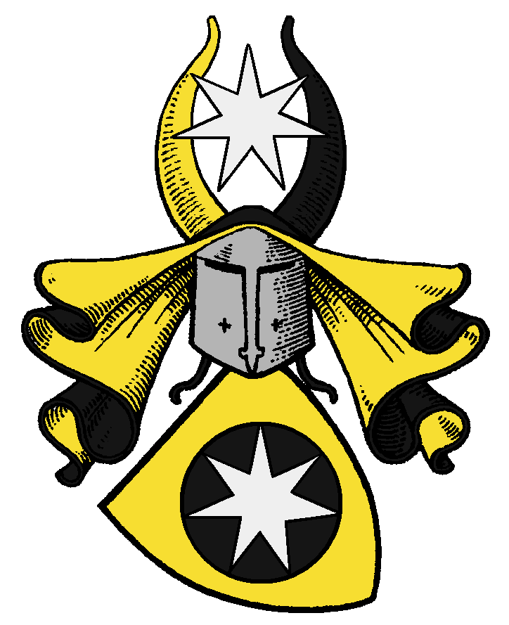 Stammwappen der von Pforr, eines alten Breisacher Stadtadelsgeschlechts.